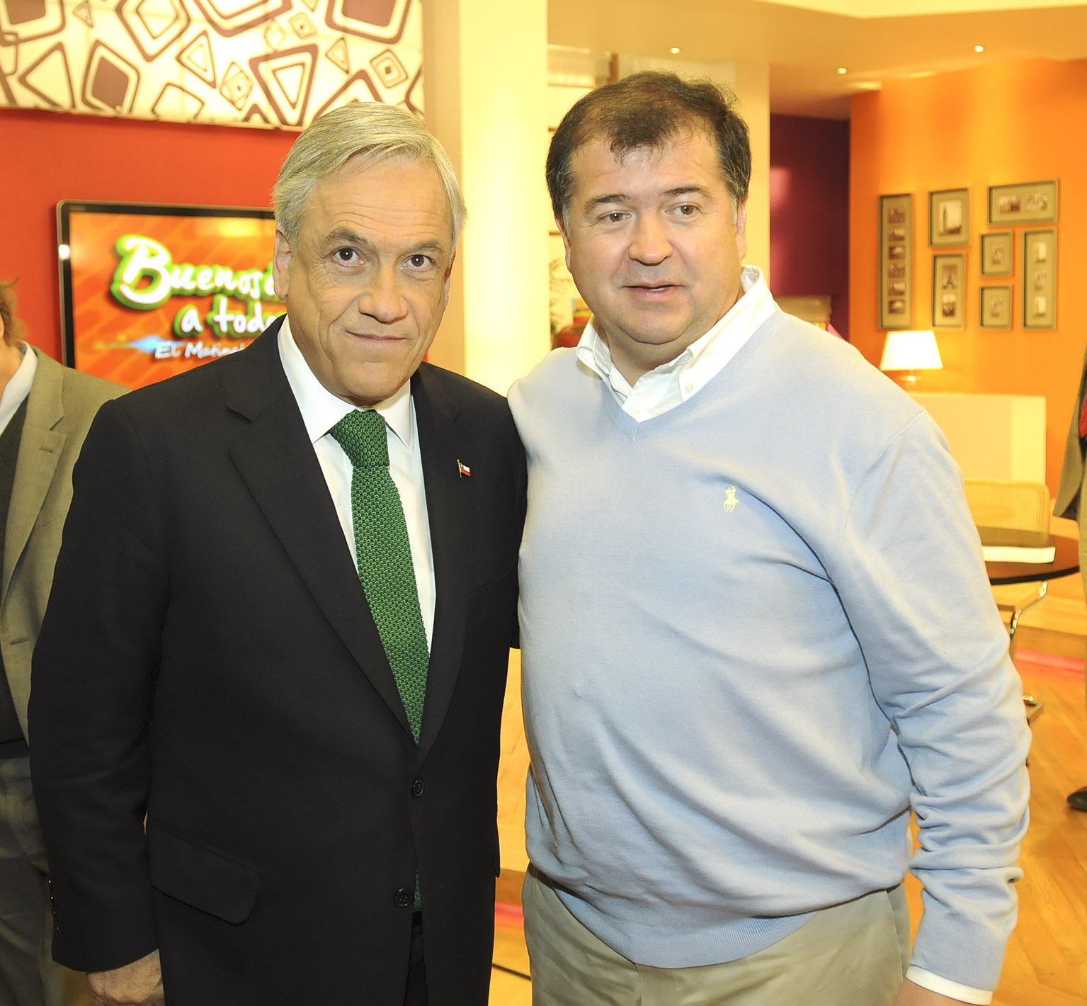 Sebastian Piñera junto a Mauricio Correa en Buenos Días a Todos.